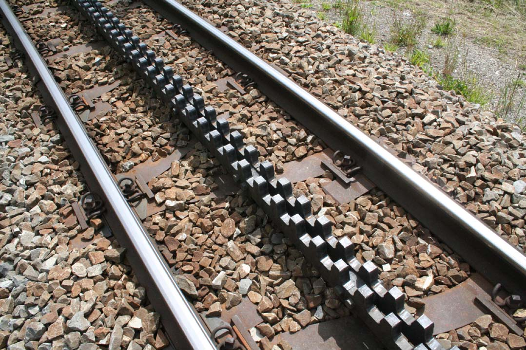 Geleise der Furka-Oberalpbahn oberhalb Andermatt